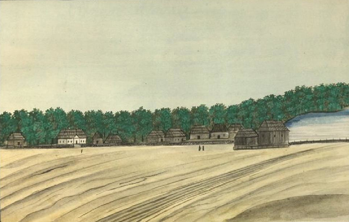 Романівка. Домінік П'єр де ля Фліз. «Медико-топографічний опис державних маєтностей Київської округи з зображенням деяких природних витворів рослинного і тваринного світу, разом із статистикою кожного села, їхнім виглядом, зробленим з натури, зображенням селянських костюмів та географічною картою Київської округи». Київ, 1854. - С. 760